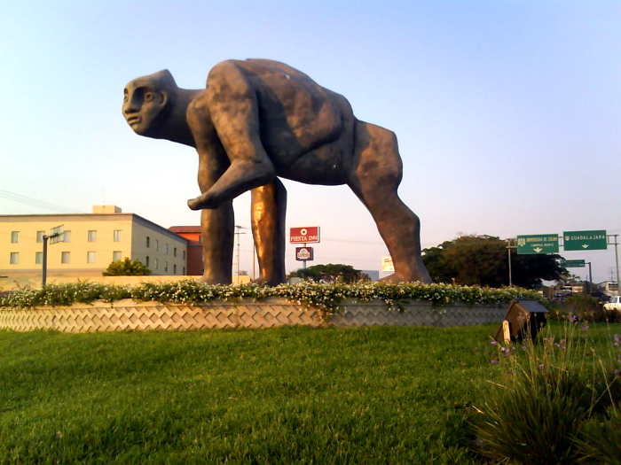 La Figura obscena en la Ciudad de Colima de José Cuevas